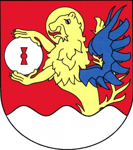 znak, Záměl, okres Rychnov nad Kněžnou